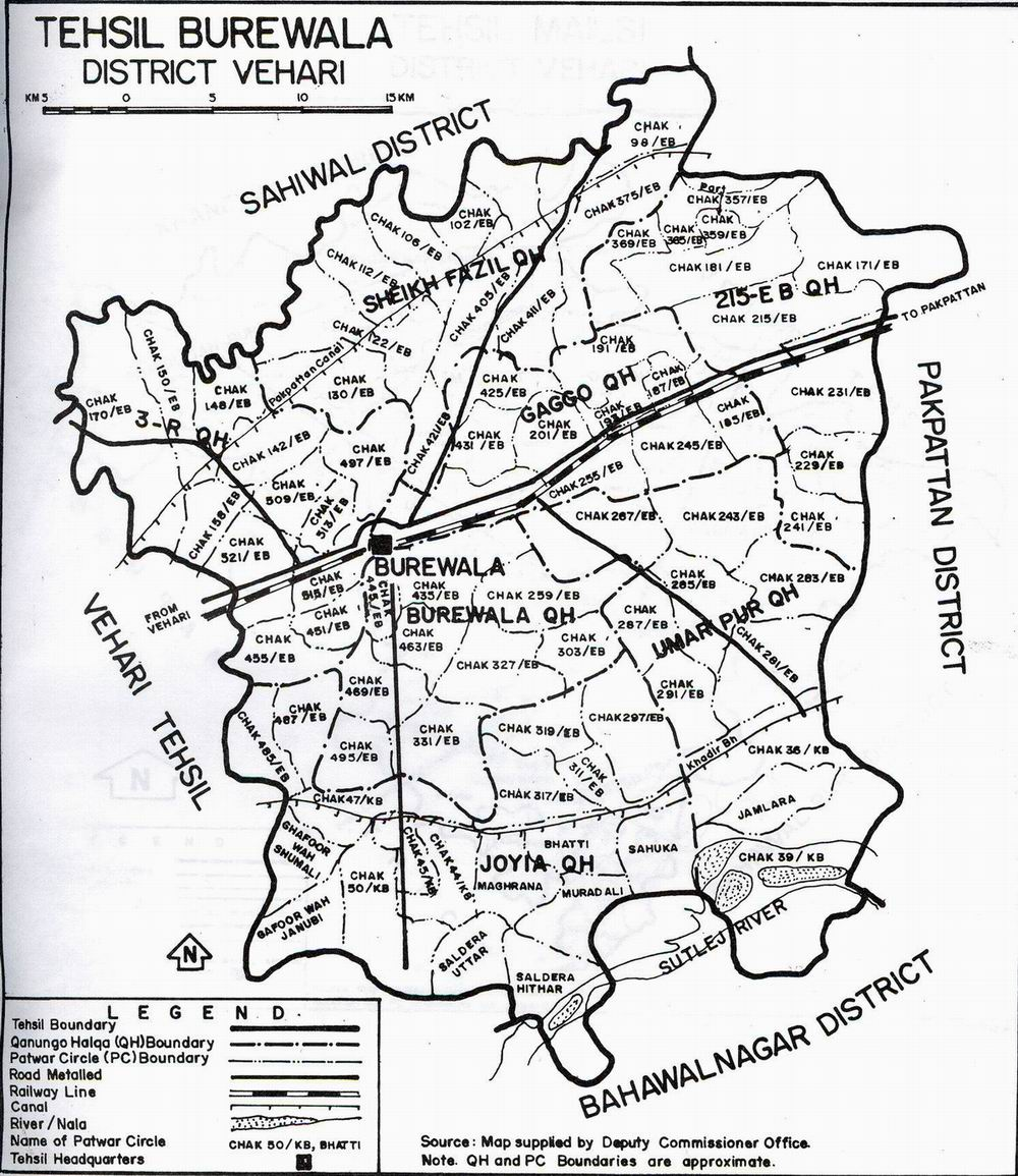 پنجابی: تحصیل بوریوالہ دے پنڈاں دا نقشہ